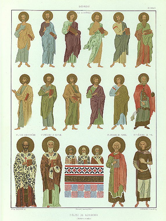 Georgie. Eglise de Bethanie, peintures murales